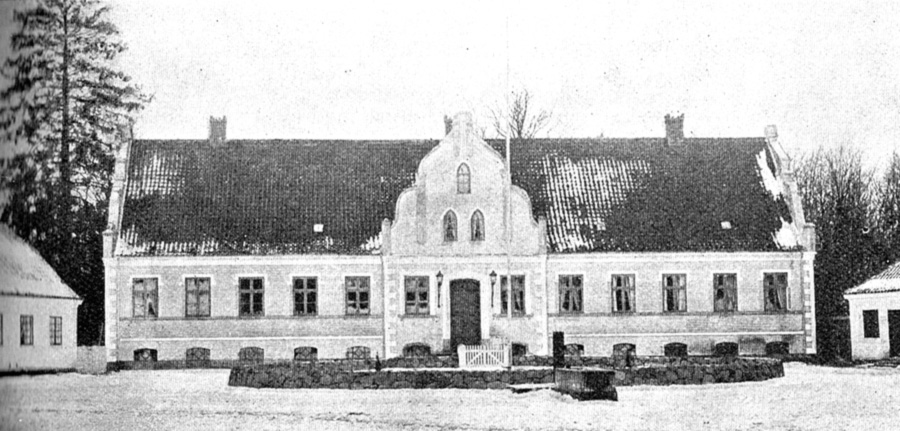 Langeskov er udskilt fra Løjtved Gods i 1782. Gården ligger i Hundstrup Sogn, Sallinge Herred, Egebjerg Kommune. Hovedbygningen er opført i 1862.